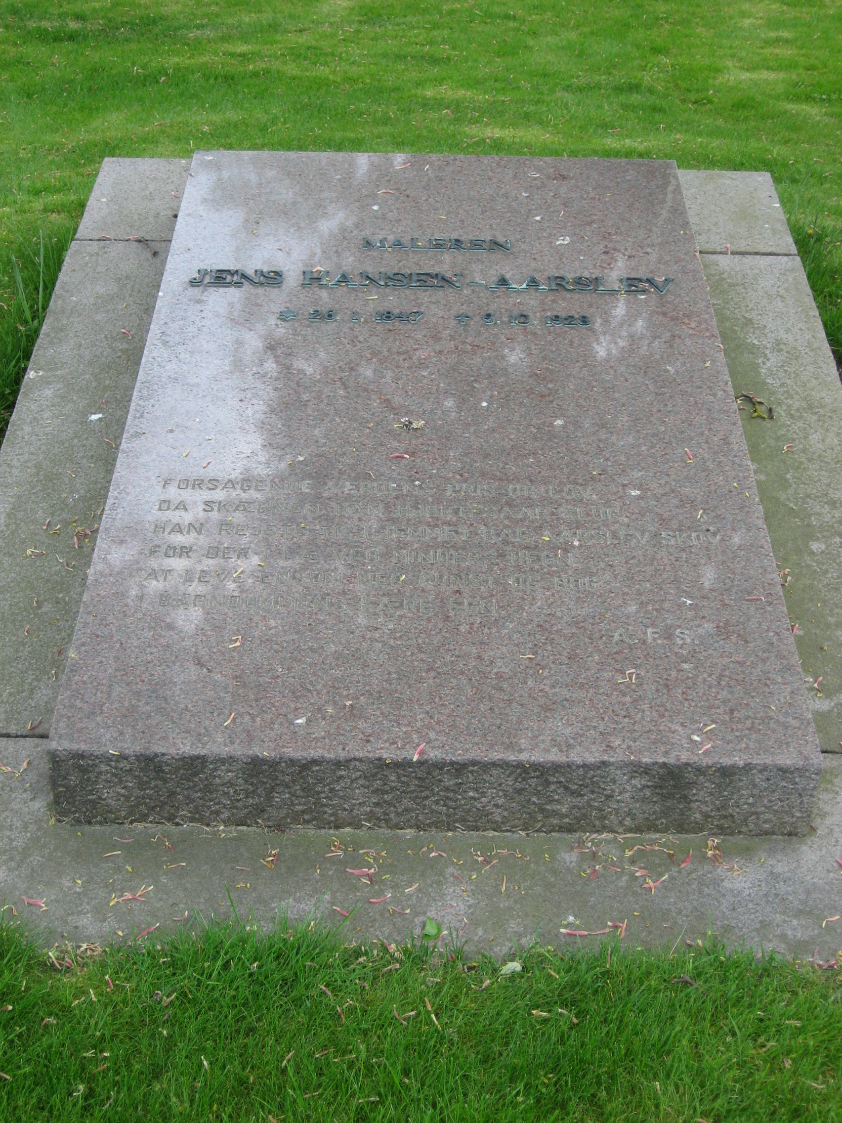 Sønder Aarslev Kirke in Sønder Årslev Sogn, Denmark. Gravestone for the painter Jens Hansen-Aarslev (1847-1928).